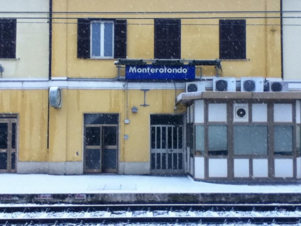 Stazione di Monterotondo-Mentana (FR1 - Orte/Fiumicino Aeroporto) sotto la neve questo febbraio.